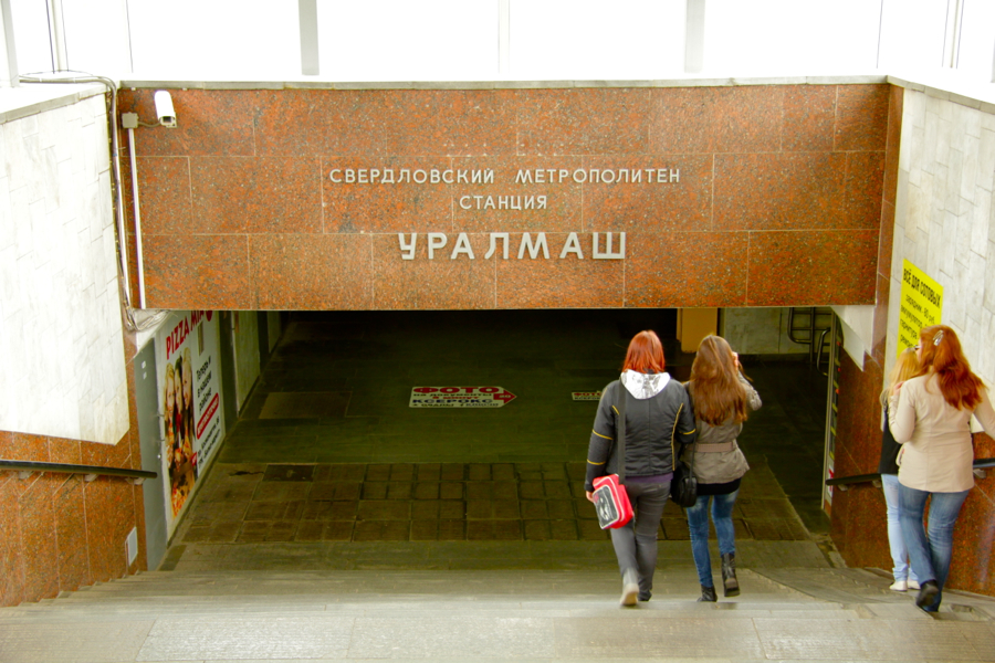 Yekaterinburg Metro (Екатеринбургский метрополитен)